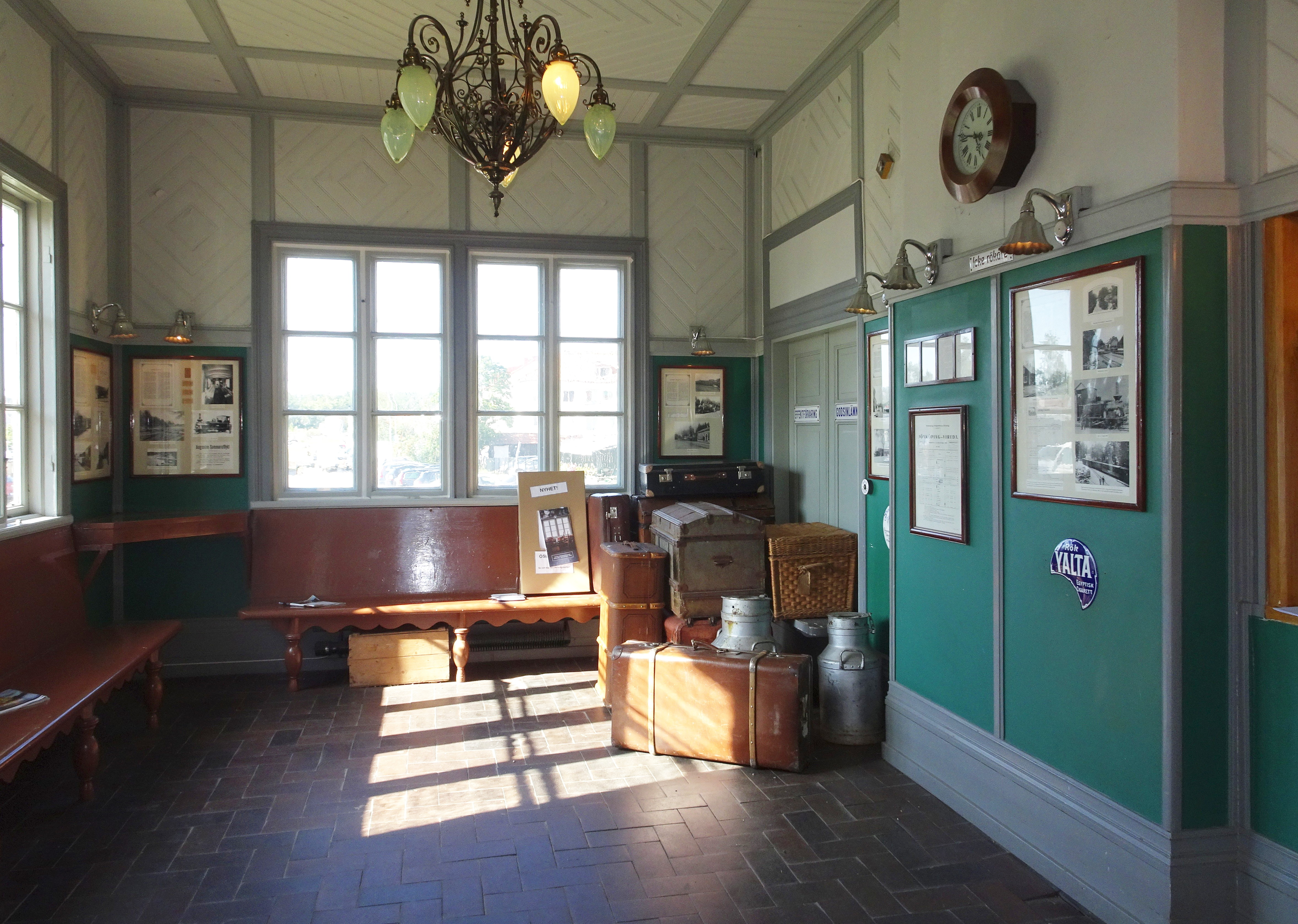 Mariefreds järnvägsstation, interiör av vänthallen